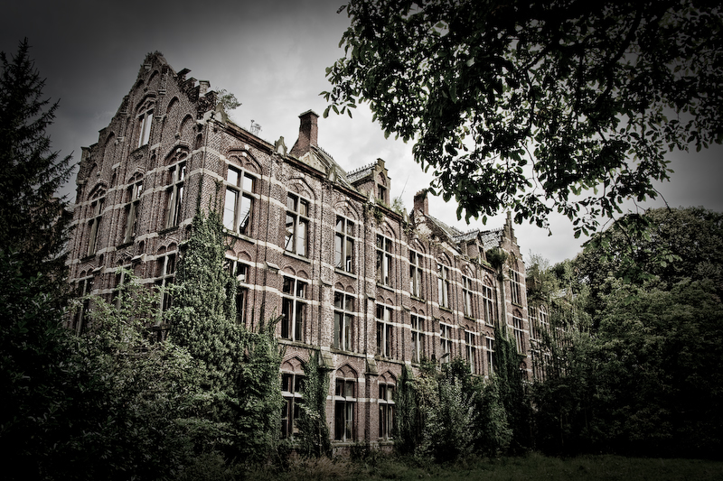 Kasteel van Mesen, Lede, Belgium (2 of 19)